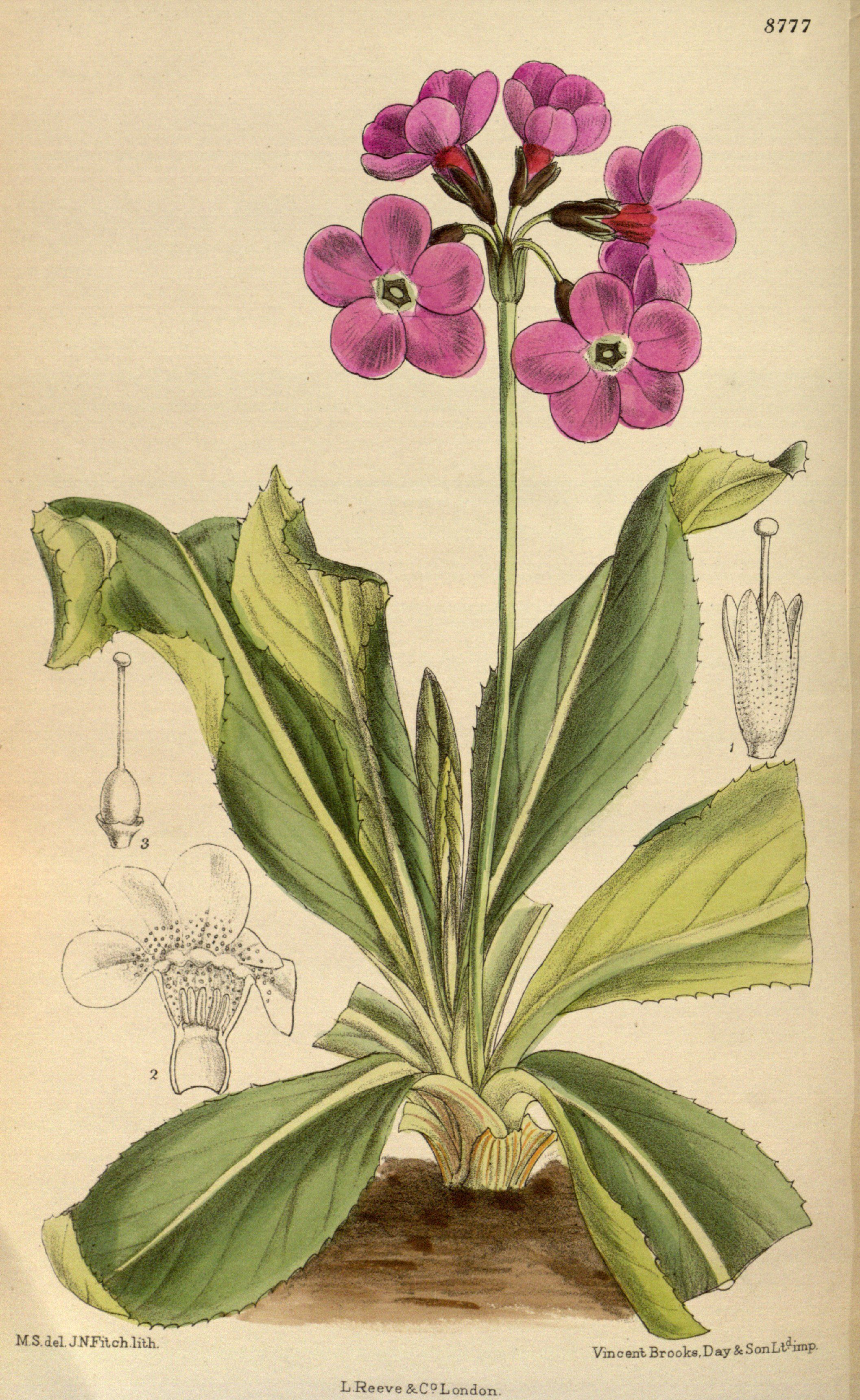 Primula sinopurpurea (= Primula chionantha), Primulaceae